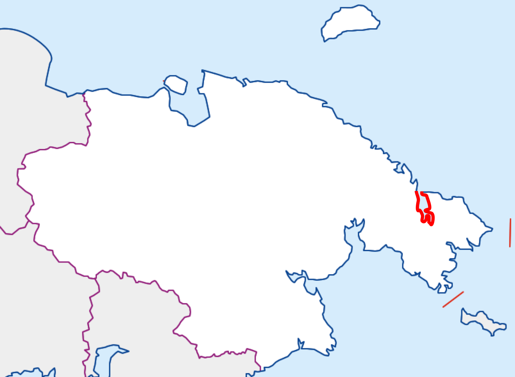 Kolyuchin Bay on the Chukotka Autonomous Okrug map